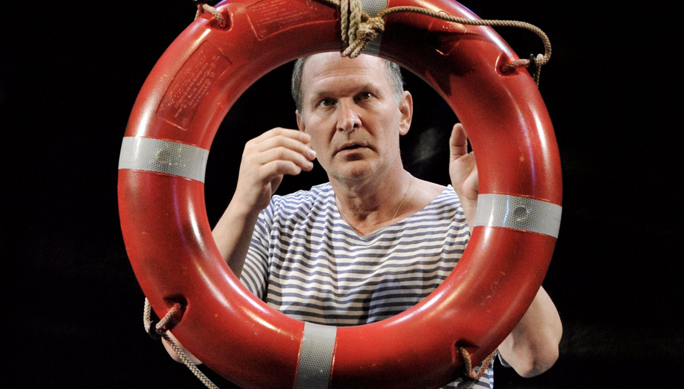 Фёдор Добронравов в спектакле Московского театра Сатиры «… и море»